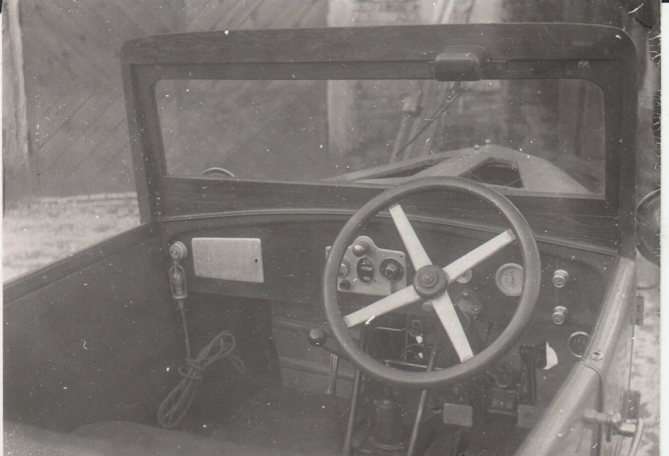 Вид кабины внутри Михлеона 1937г